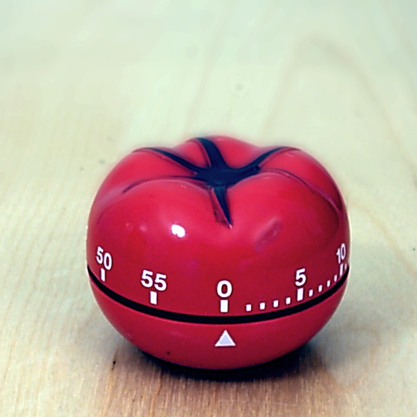 Autore: Francesco Cirillo rilasciata a Erato nelle sottostanti licenze seguirÃ OTRS